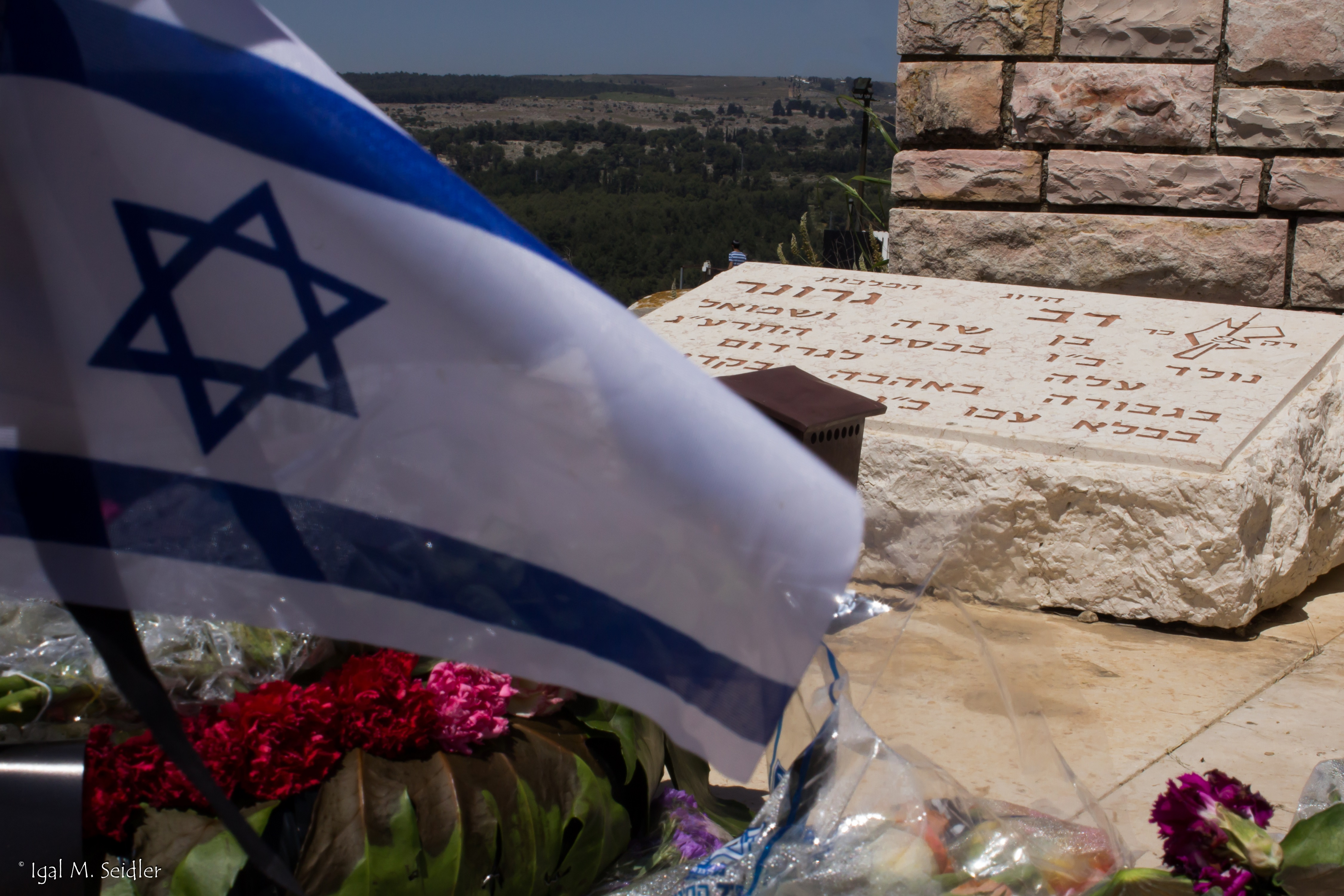 קברו בבית העלמין העתיק בצפת